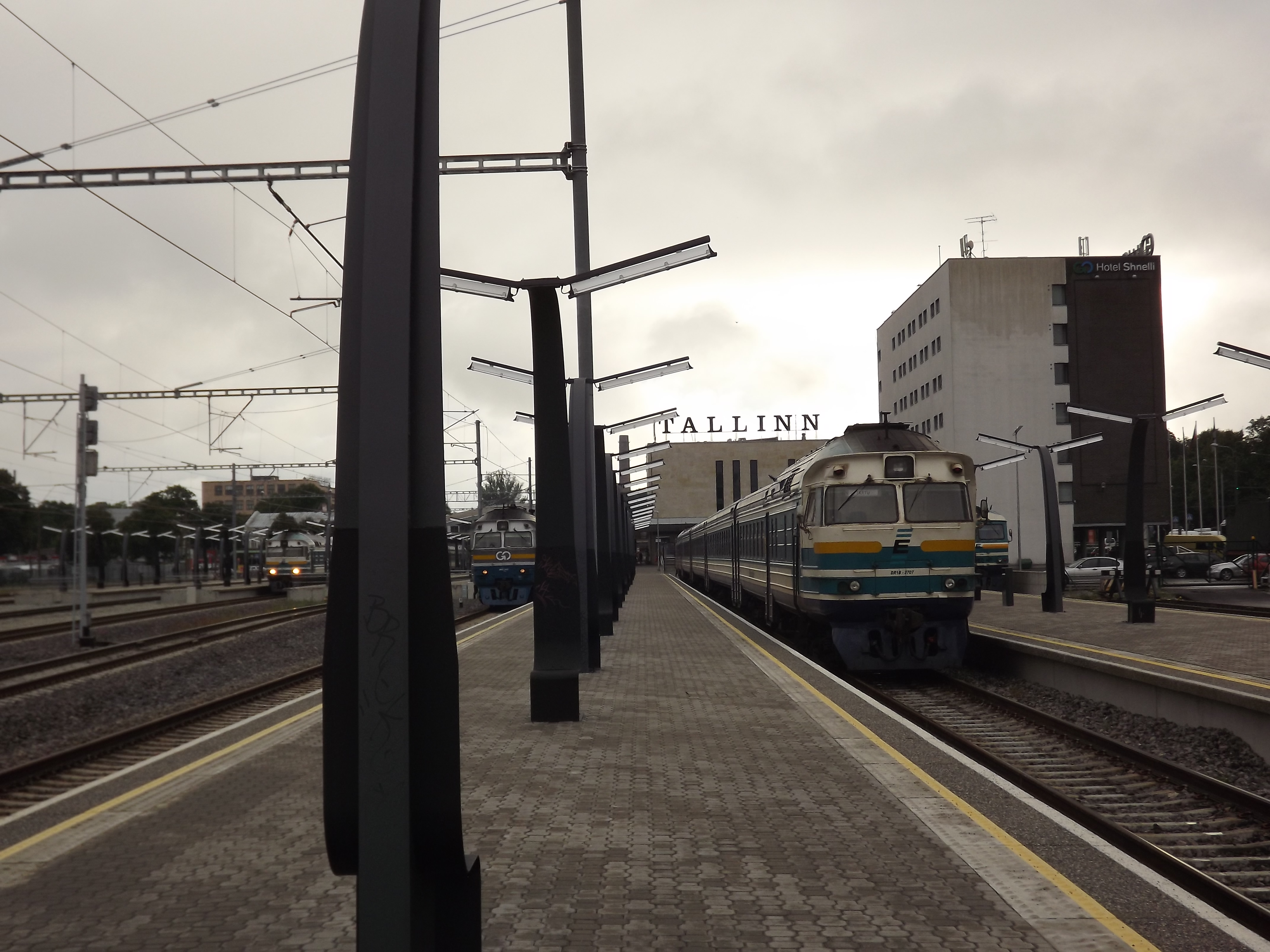 Balti jaama perroon